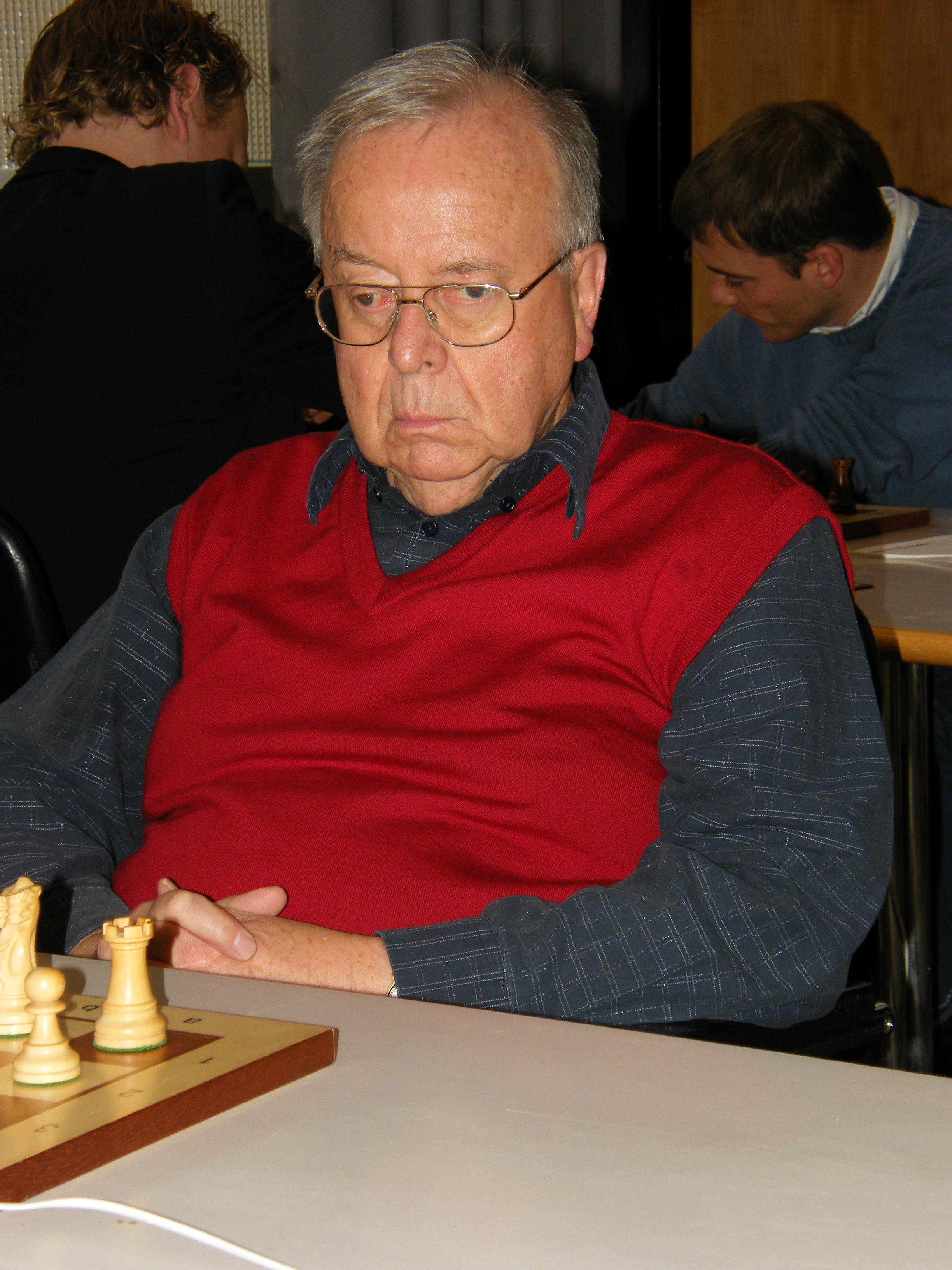 Wolfgang Uhlmann bei der 3. Runde der Schach-Bundesliga 2008/09 im Rathaus Schöneberg in Berlin